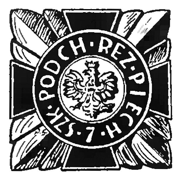 Batalion Podchorążych Rezerwy Piechoty Nr 7